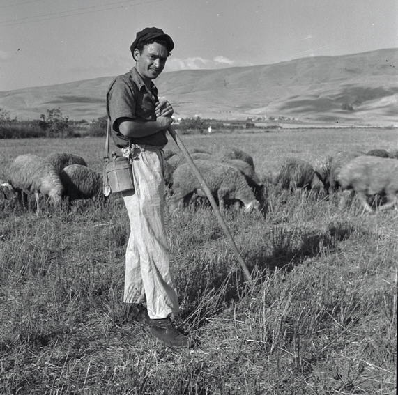 אפיקים - העדר של אפיקים במרעה